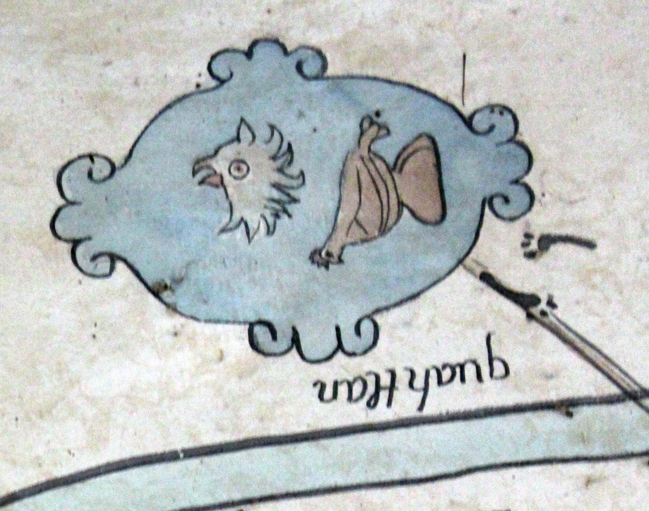 El glifo toponímico de Huautla o Quauhtlan, registrado en el Lienzo de la Provincia de Tzicohuac, datado en el siglo XVI. Detalle tomado de una copia del lienzo ubicado en el Museo Arqueológico de Xochimilco. Foto: Daniela Peña Salinas. Edición: Alfonso Vite Hernández